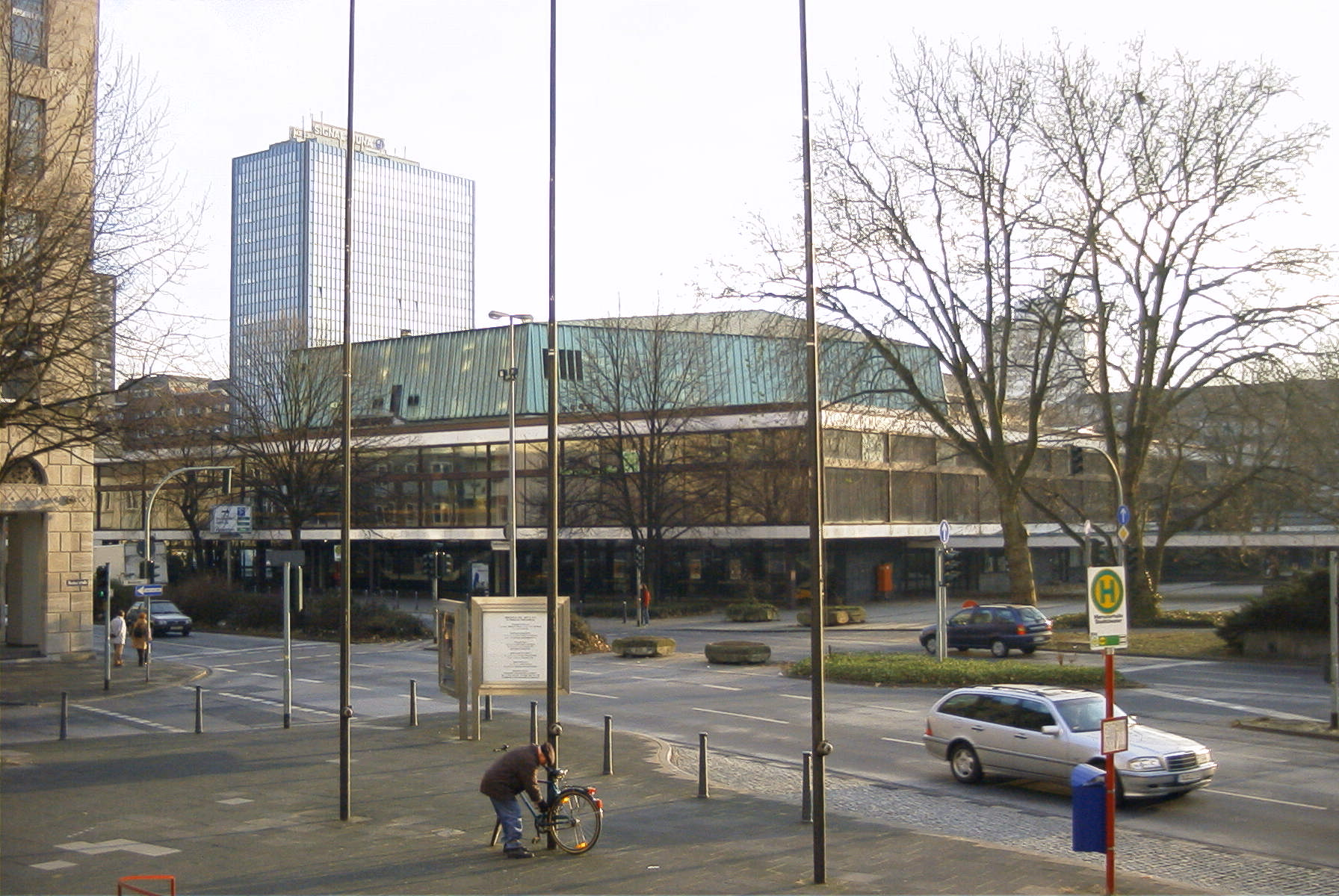 Vom Haupteingang des Stadttheaters Duisburg bot sich dem Betrachter dieser Anblick auf die Nordwestseite der alten Mercatorhalle.